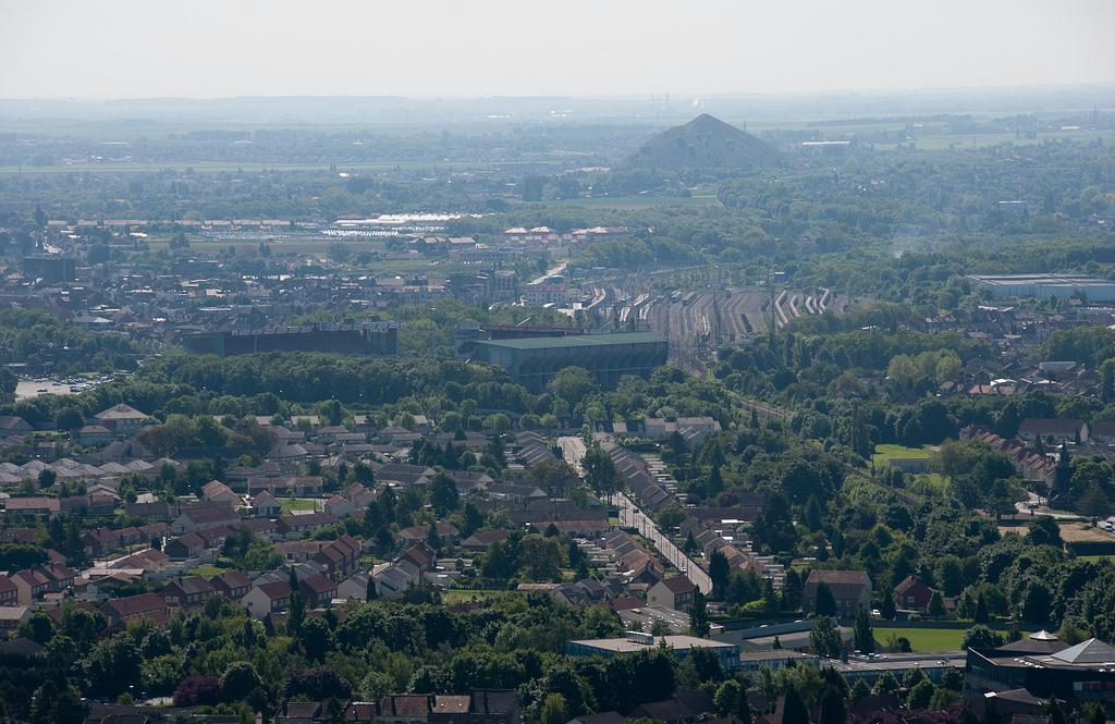 Le stade Bollaert et ses alentours.